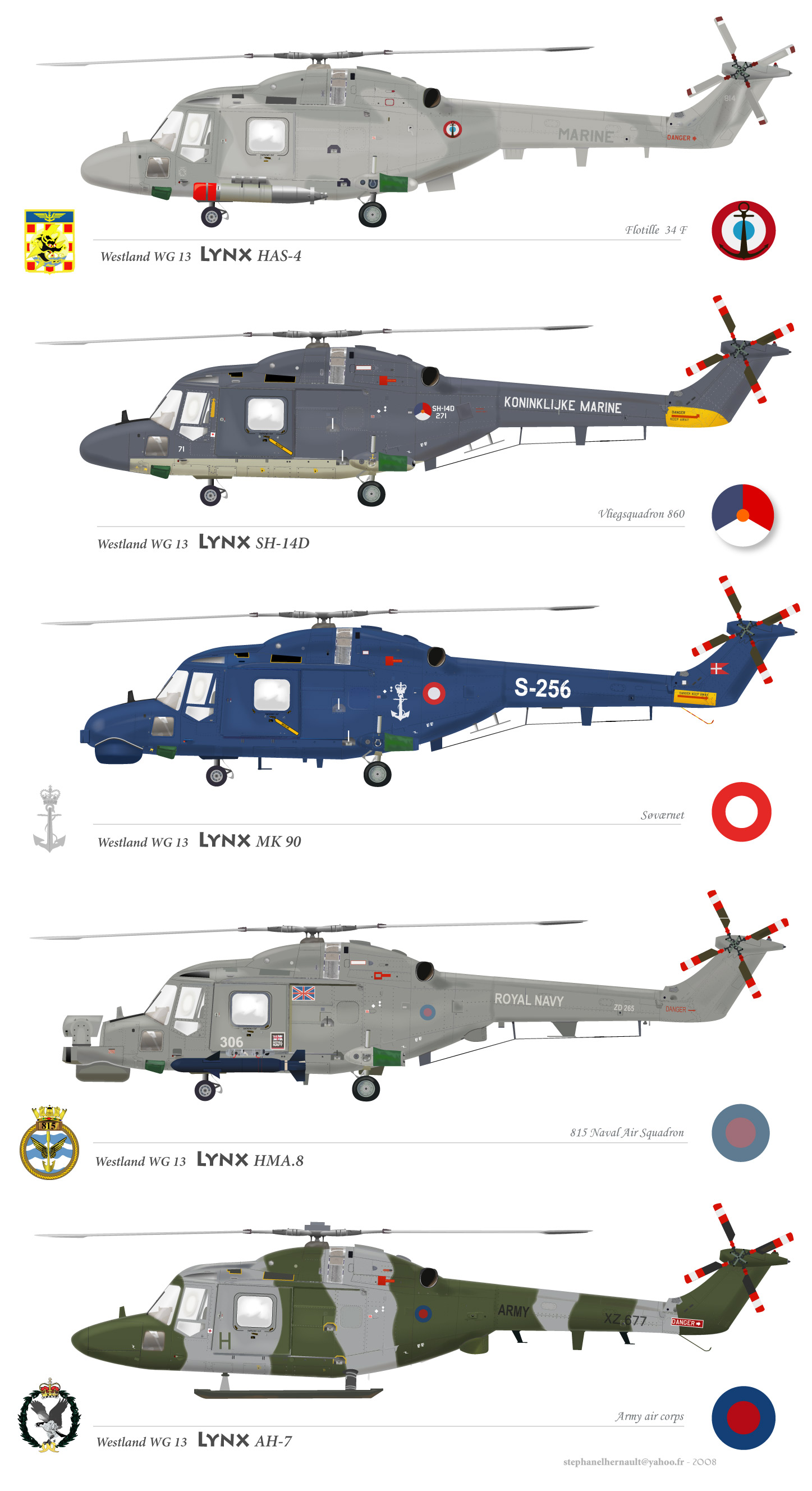 Westalnd Lynx Family